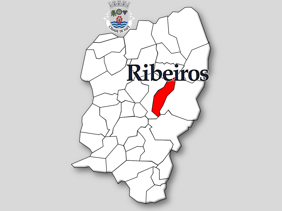 Censos 1864/2011